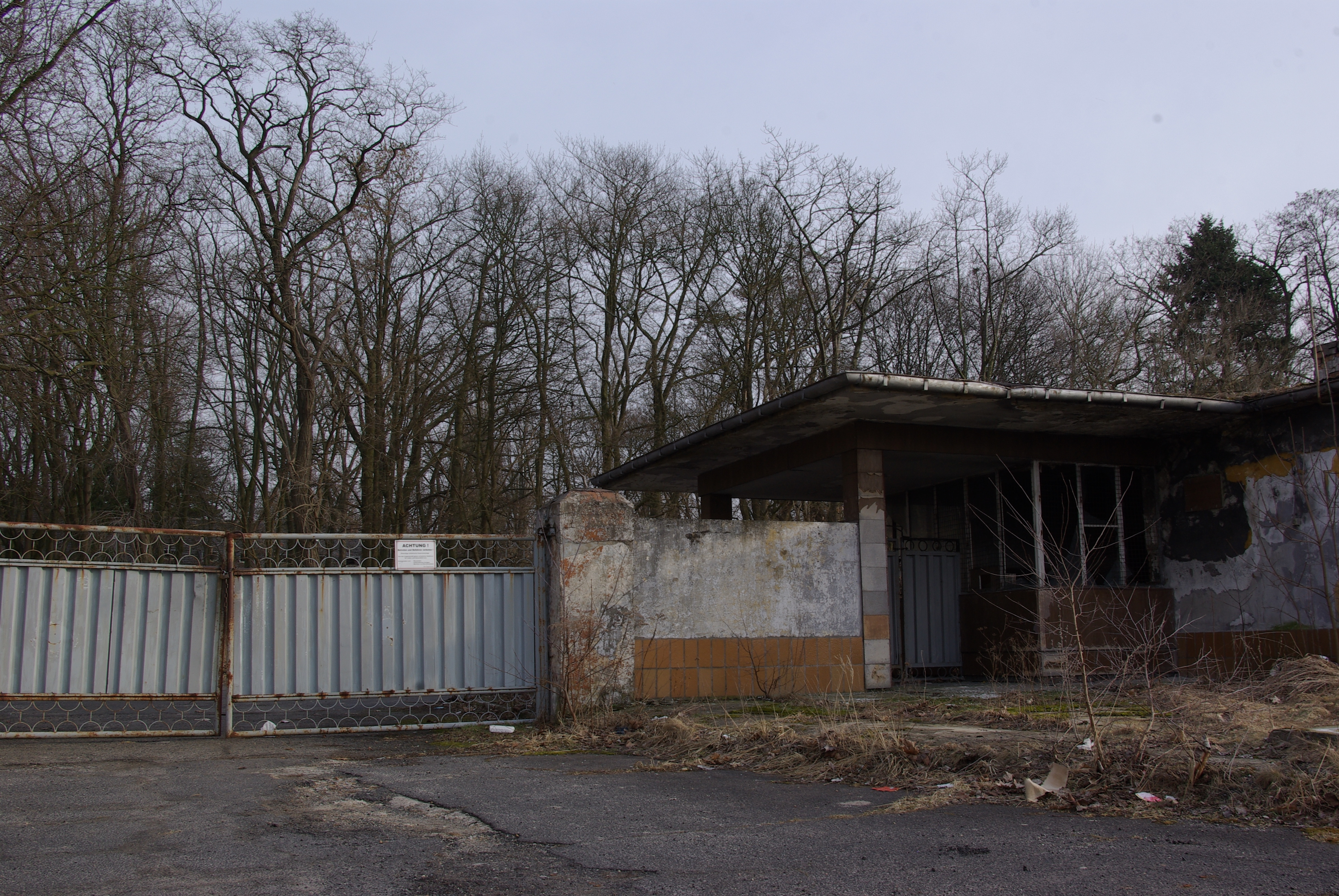 Jüterbog in Brandenburg. Im Stadtteil Damm befindet sich der ehemalige Fliegerhorst, er steht unter Denkmalschutz. Zu sehen ist der Eingang von der Dennerwitzer Straße aus.